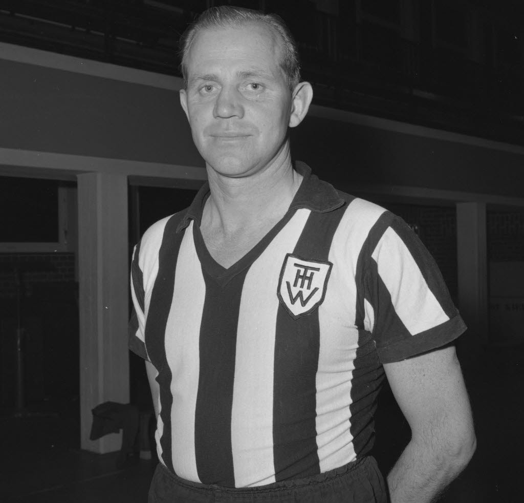 Handballspieler des THW Kiel in der Saison 1964/65.